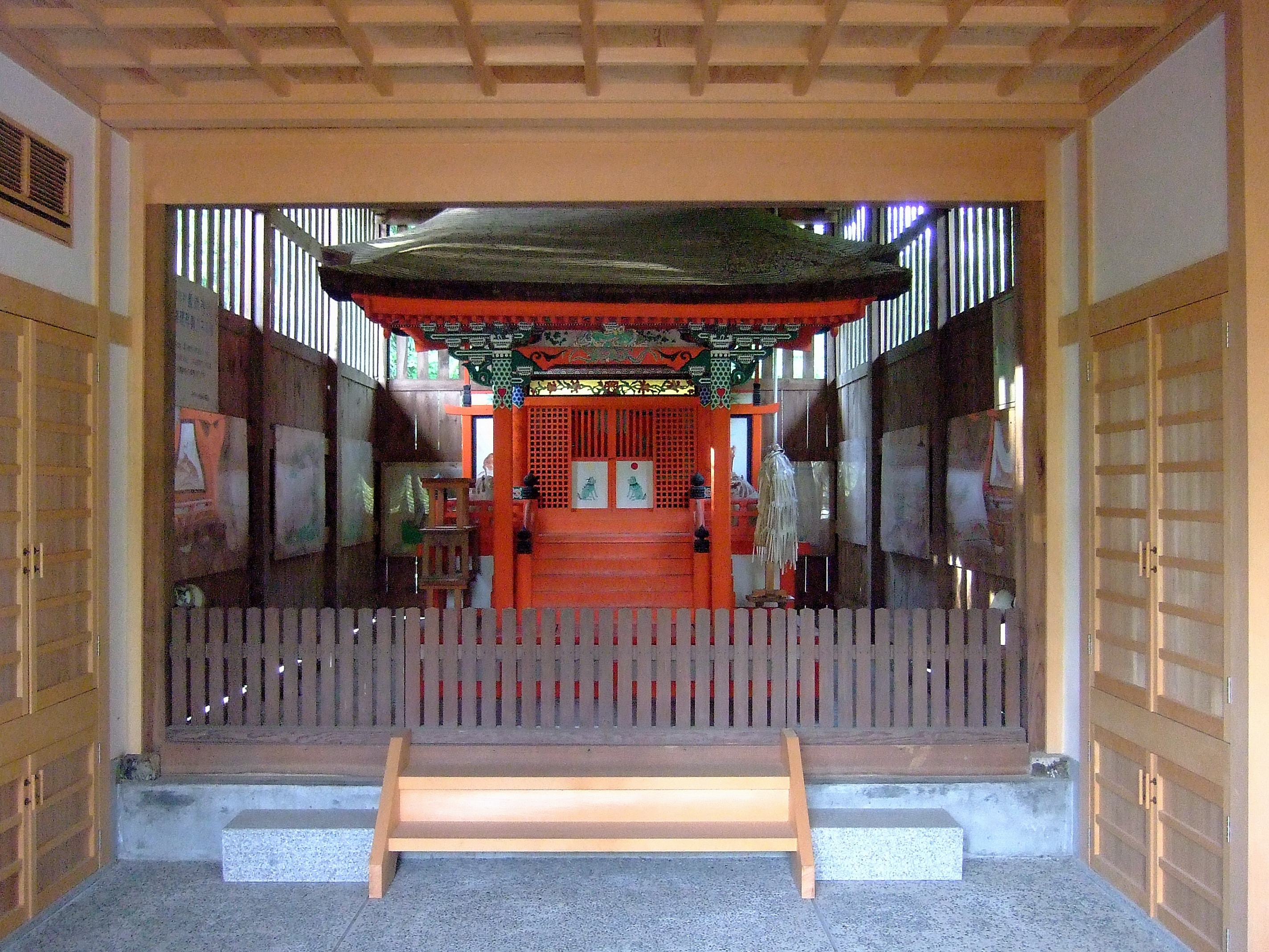 神戸市北区大沢町市原豊歳神社